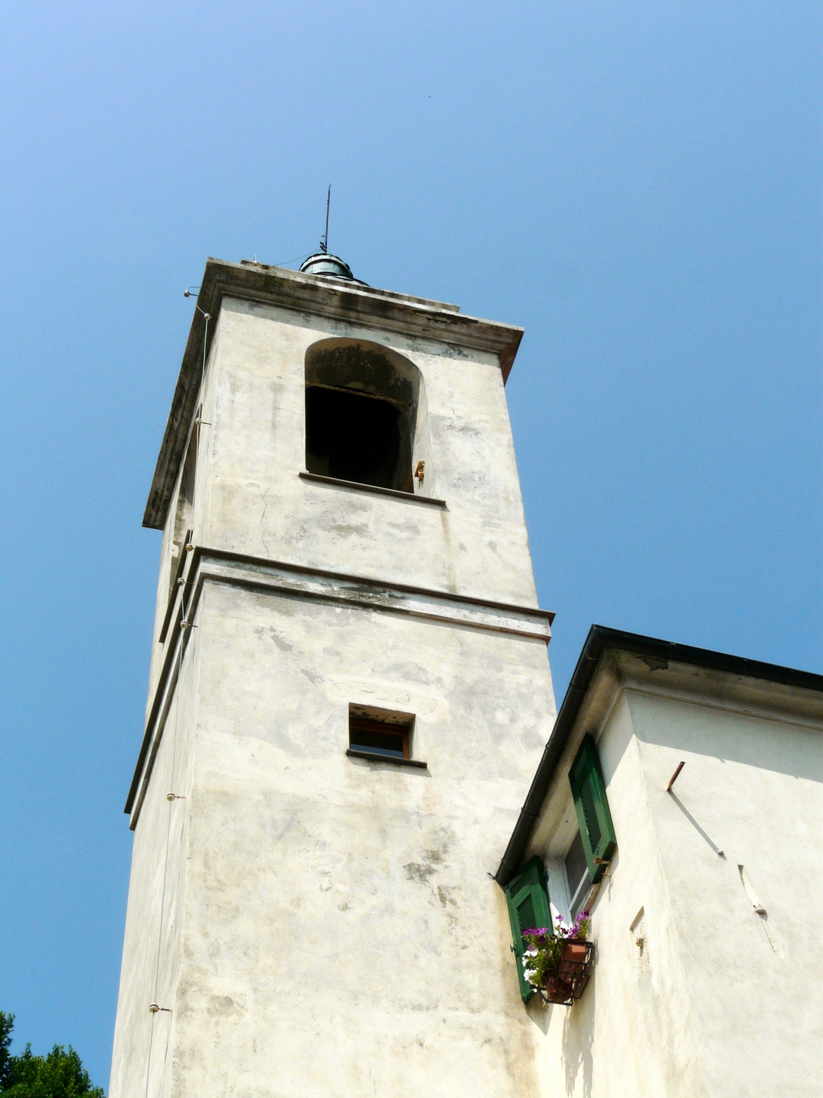 Campanile dell'oratorio della Natività di Maria Santissima, Masone, Liguria, Italia